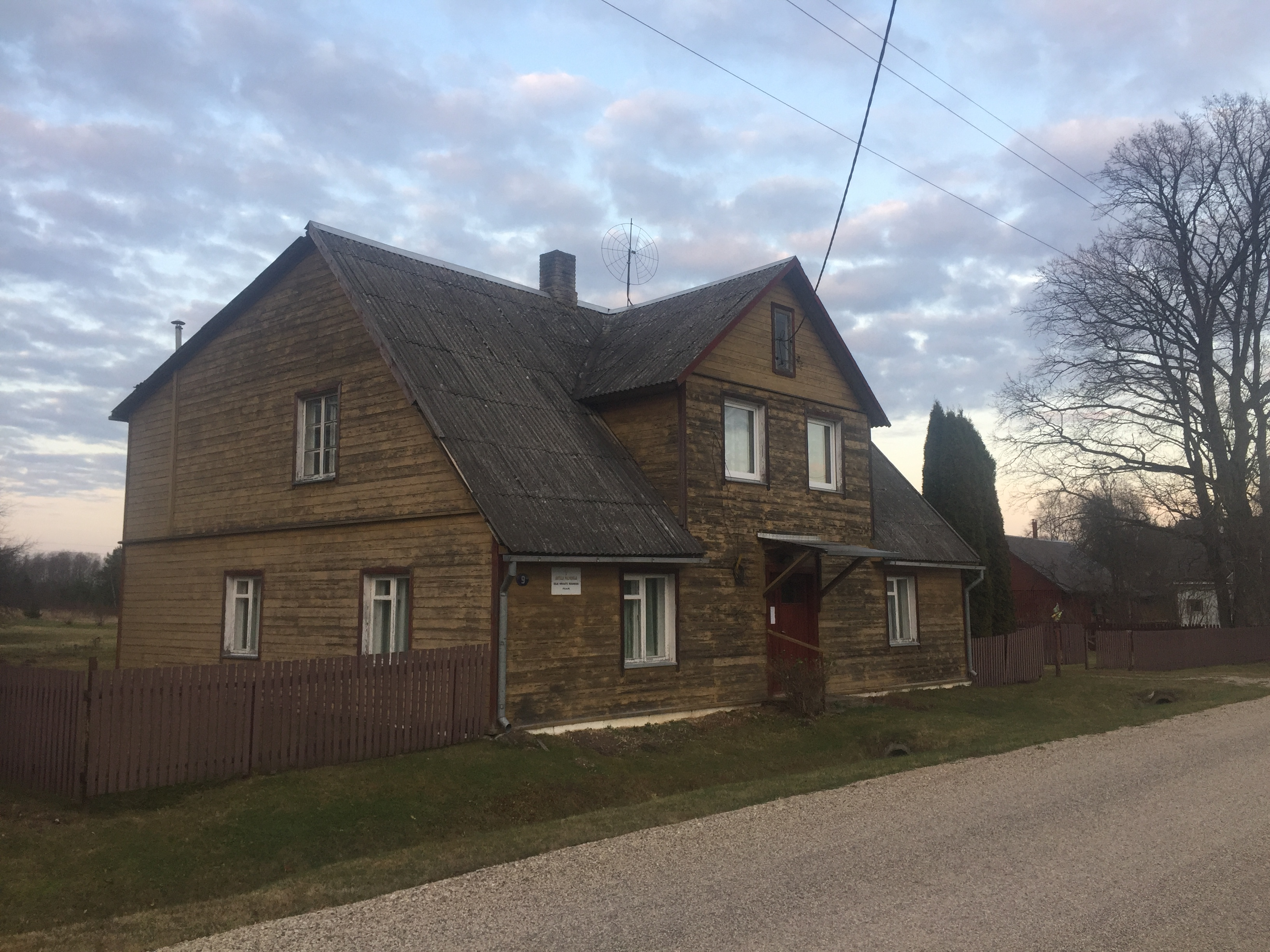 Antsla Nahksepa palvemaja novembris 2019.